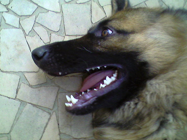 Foto de um pastor alemão.